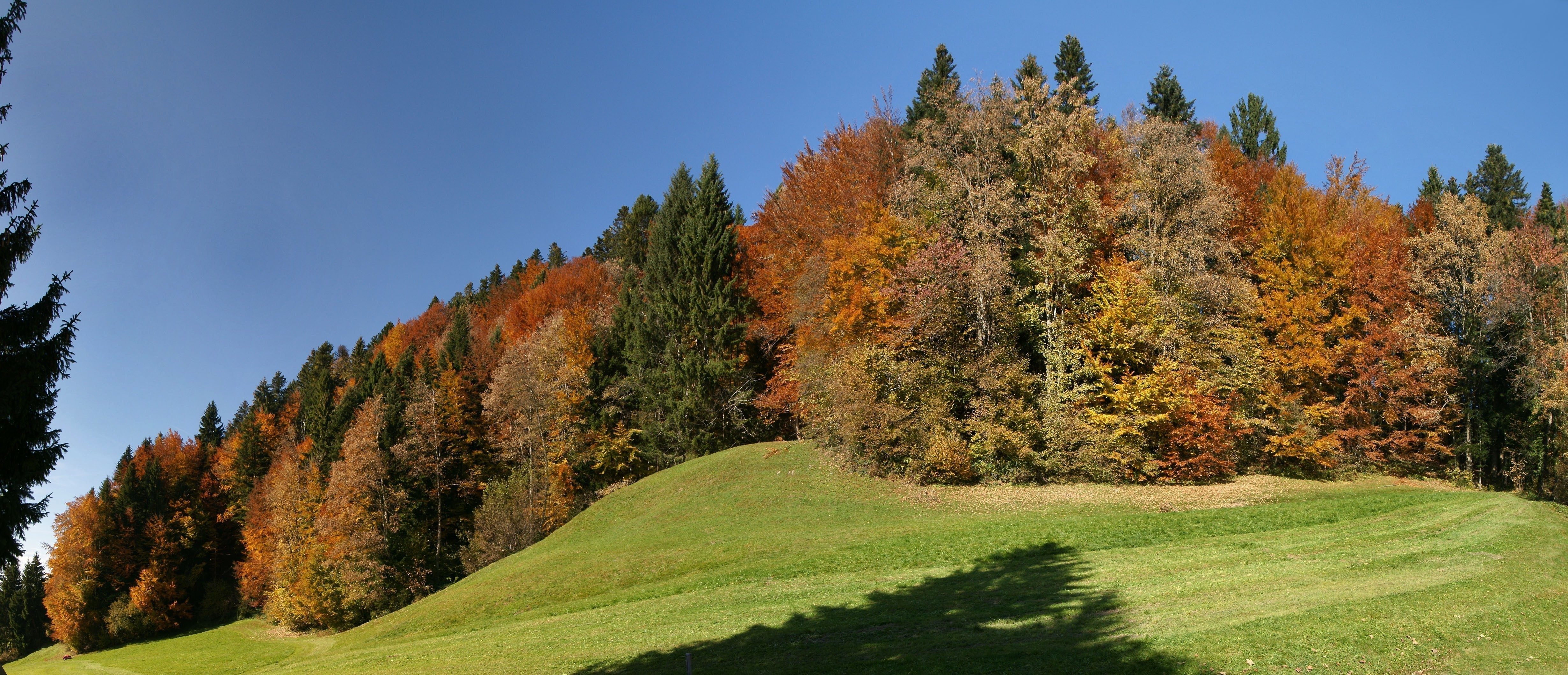 Mischwald am Sulzberg mit Buchen, Ahorn, Gemeine Esche Pappeln sowie dem Nadelbaum, der Fichte u.a.